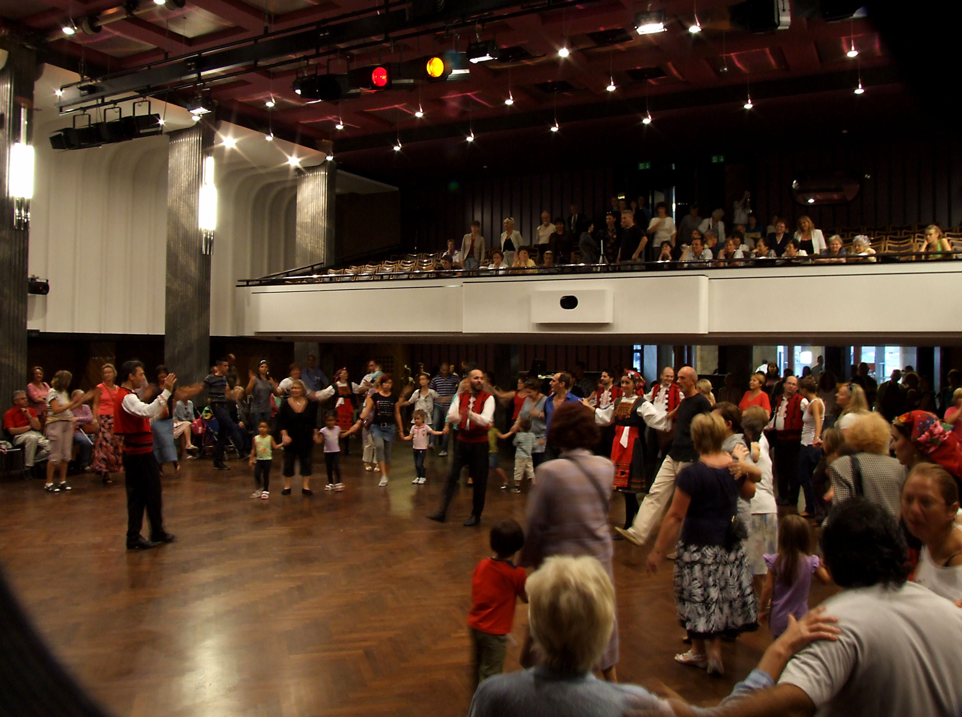 MOM Kulturális Központ nyitó ünnepség. Görög Táncház.